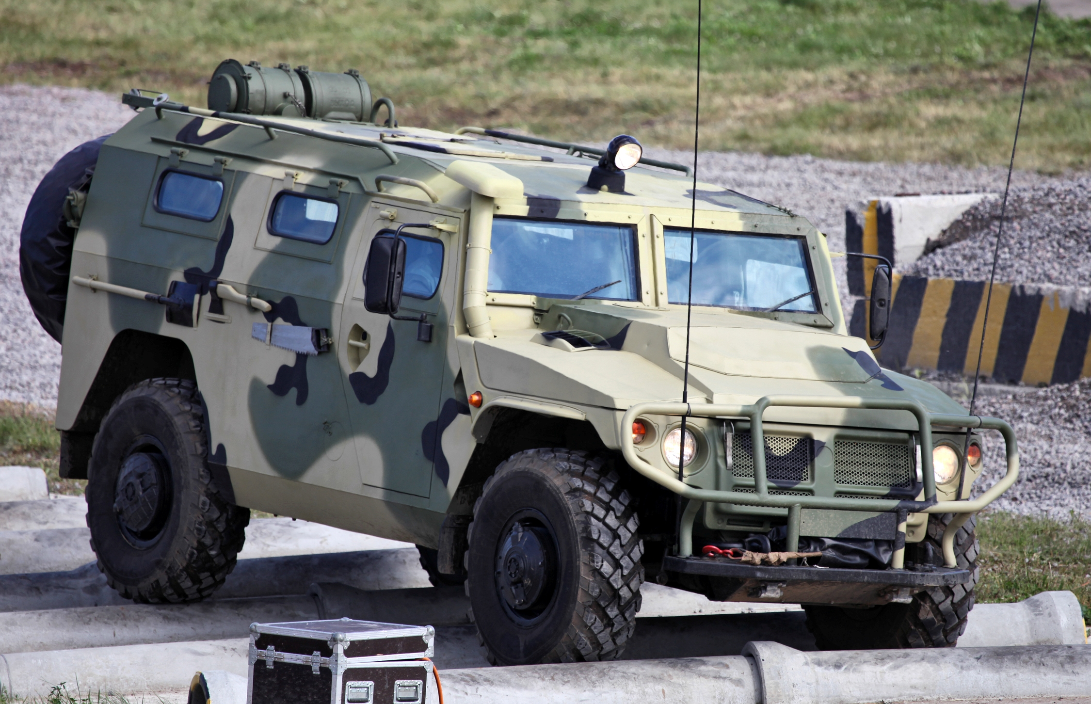 Бронеавтомобиль ВПК-233114 Тигр-М (VPK-233114 Tigr-M armoured vehicle)